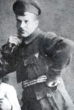 Кожин Фома (? - 08.1921) Анархіст махновець.